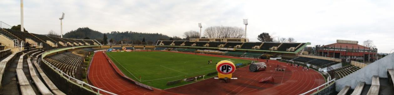 Estadio Regional de Concepción - Chile